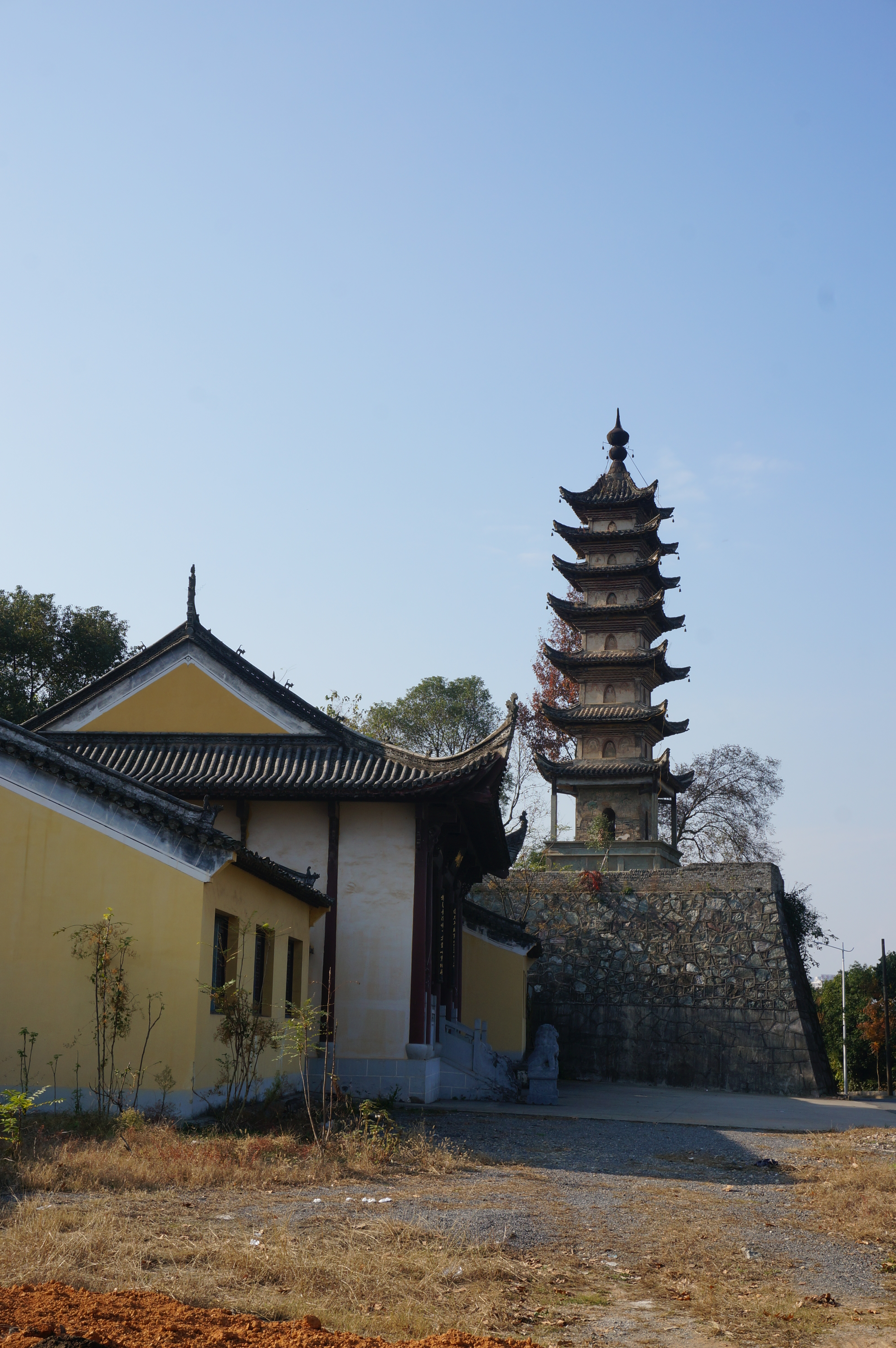 歙县长庆寺塔，塔东面及太平兴国寺山门。